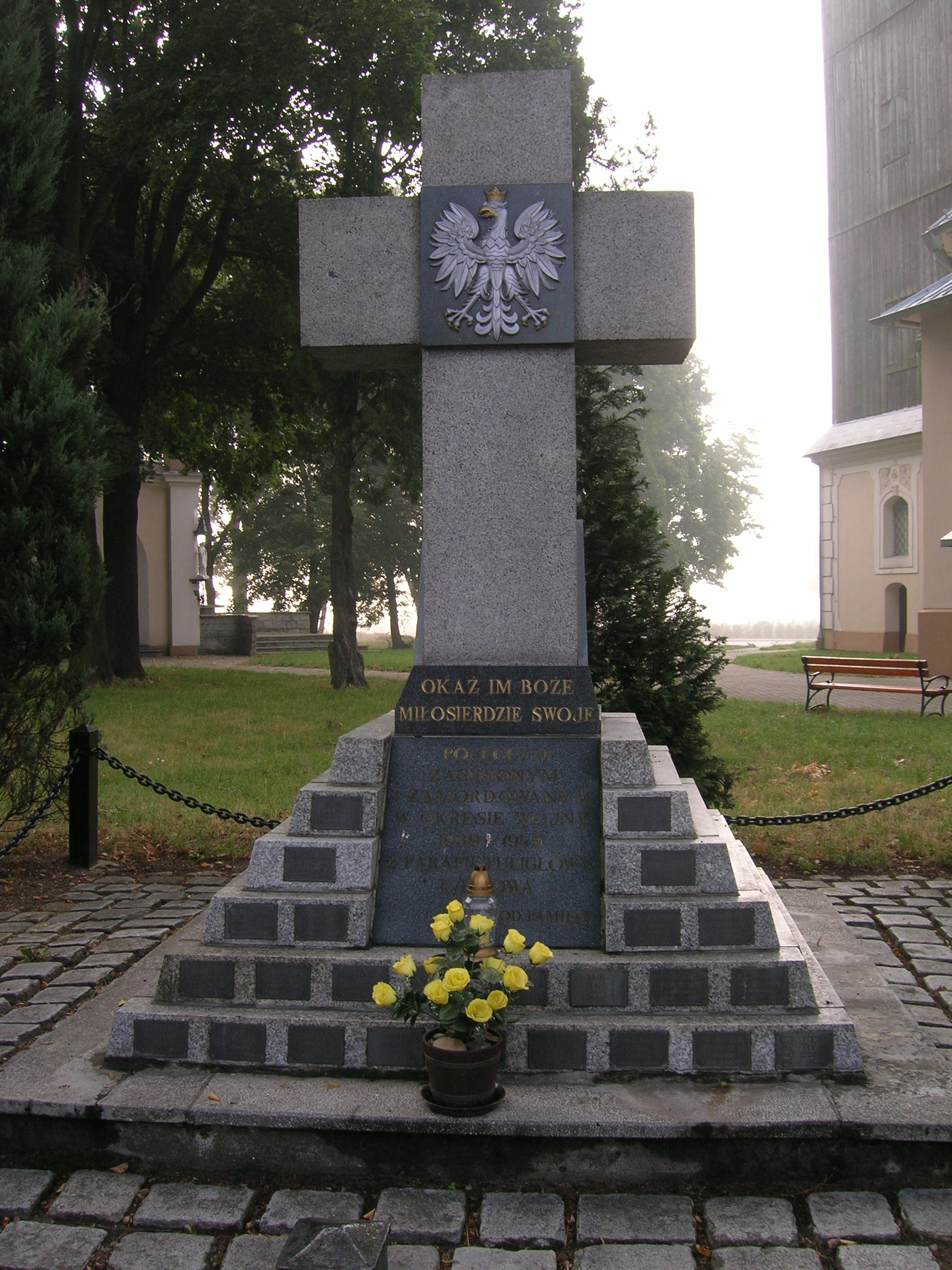 Pomnik poległych, zamordowanych i zaginionych mieszkańców parafii Tuligłowy w Łozinie